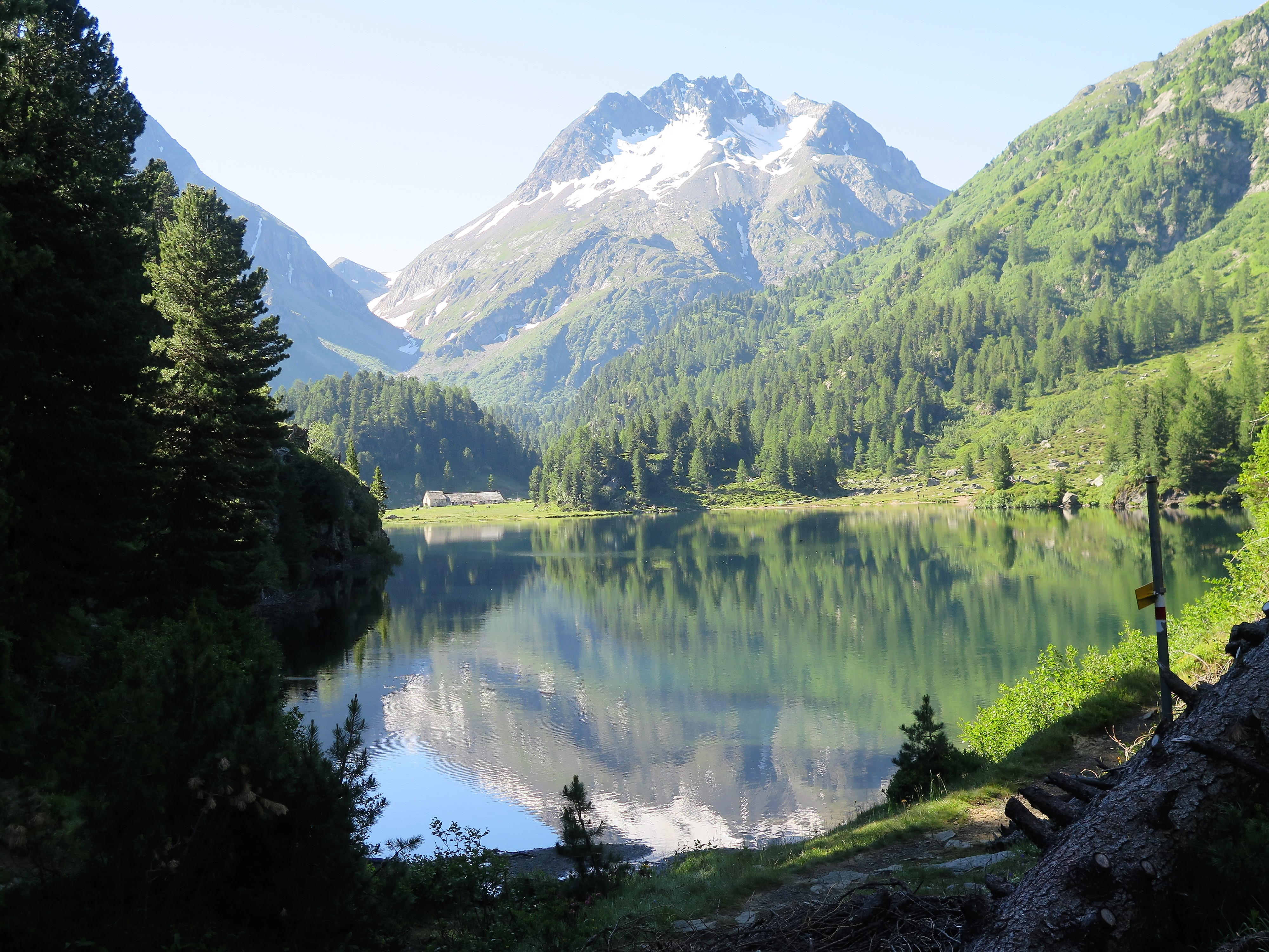 Lägh da Cavloc (Cavlociasee) bei Maloja, im Hintergrund die Pizzi dei Rossi im Fornotal